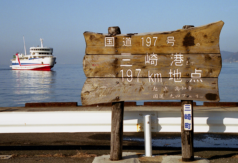 国道九四フェリー ニュー豊予2 と国道197号の看板